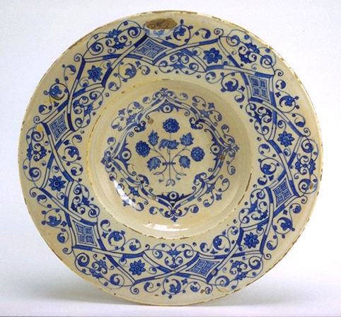 Piatto di Cafaggiolo con decoro "alla porcellana". Prima metà del XVI secolo.